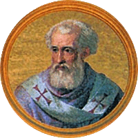 Papa Gelasio II Foto tratta dal sito